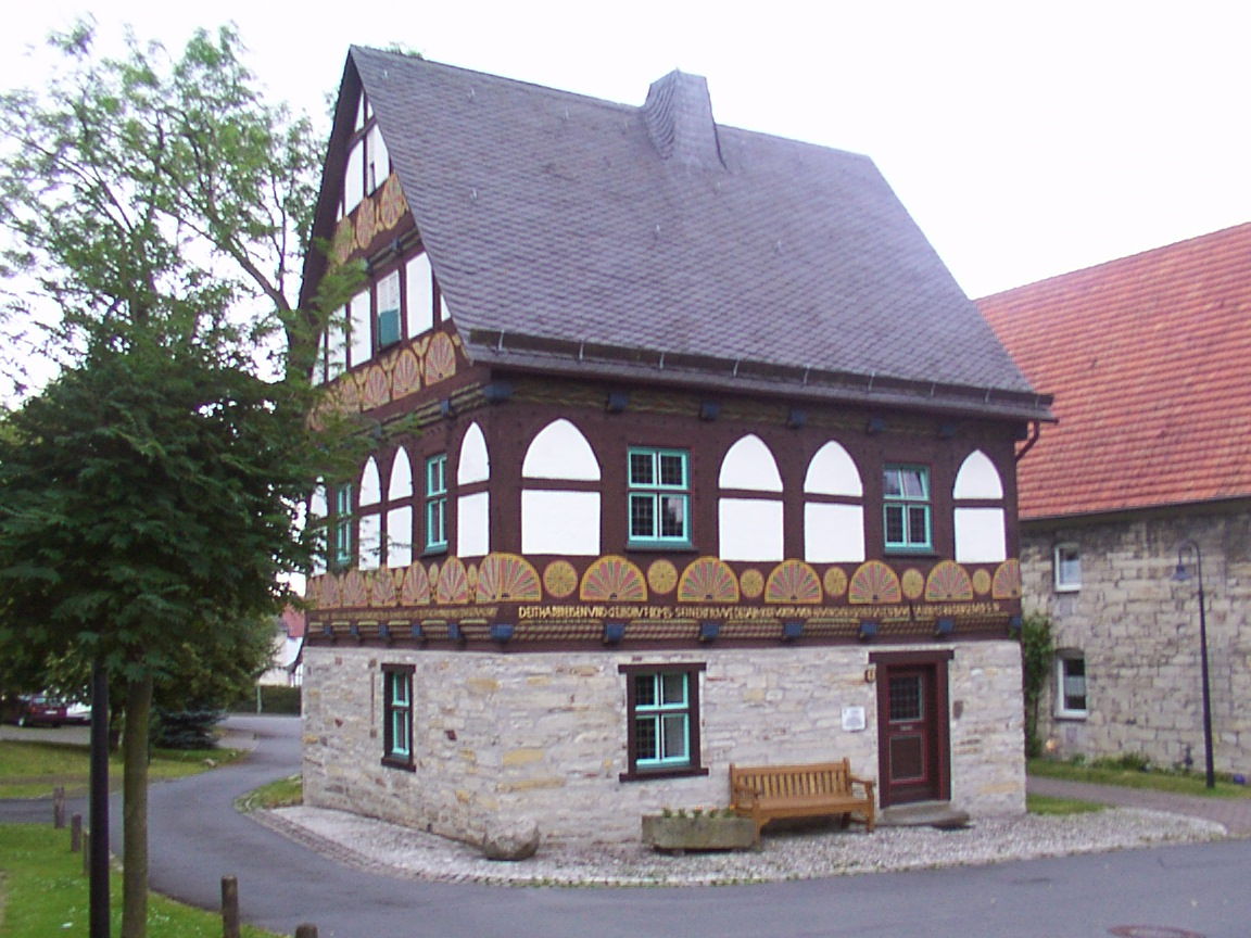 Lichtenau (Westfalen): Alter Spieker von 1588 in Atteln This is a photograph of an architectural monument.